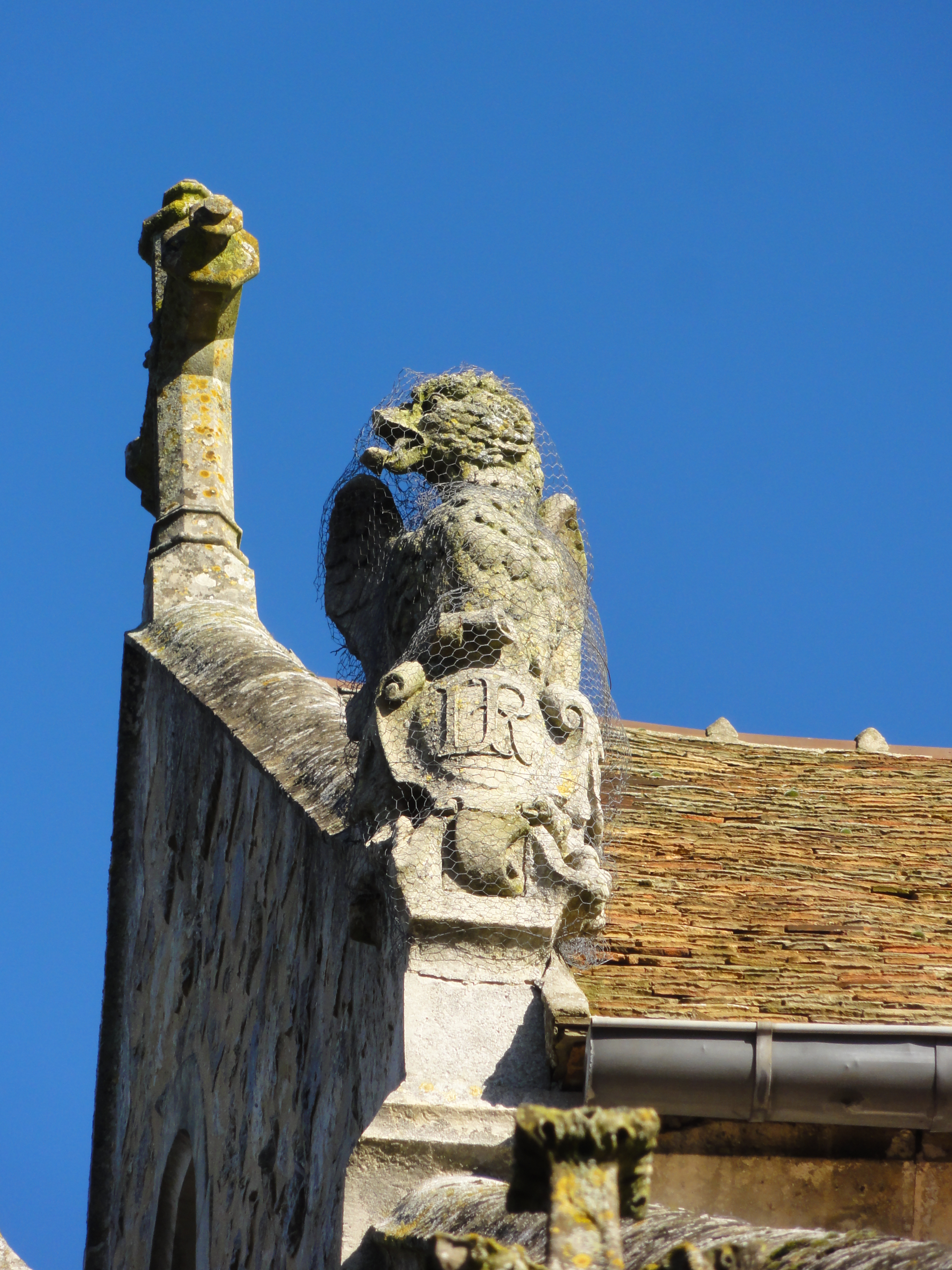 Voir titre.